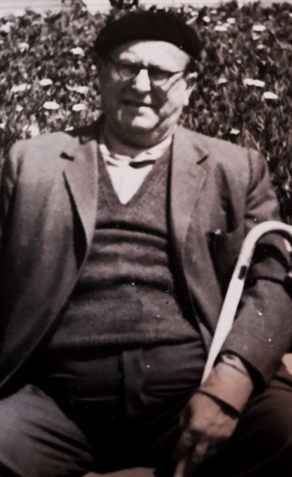 El poeta tivissà assegut.